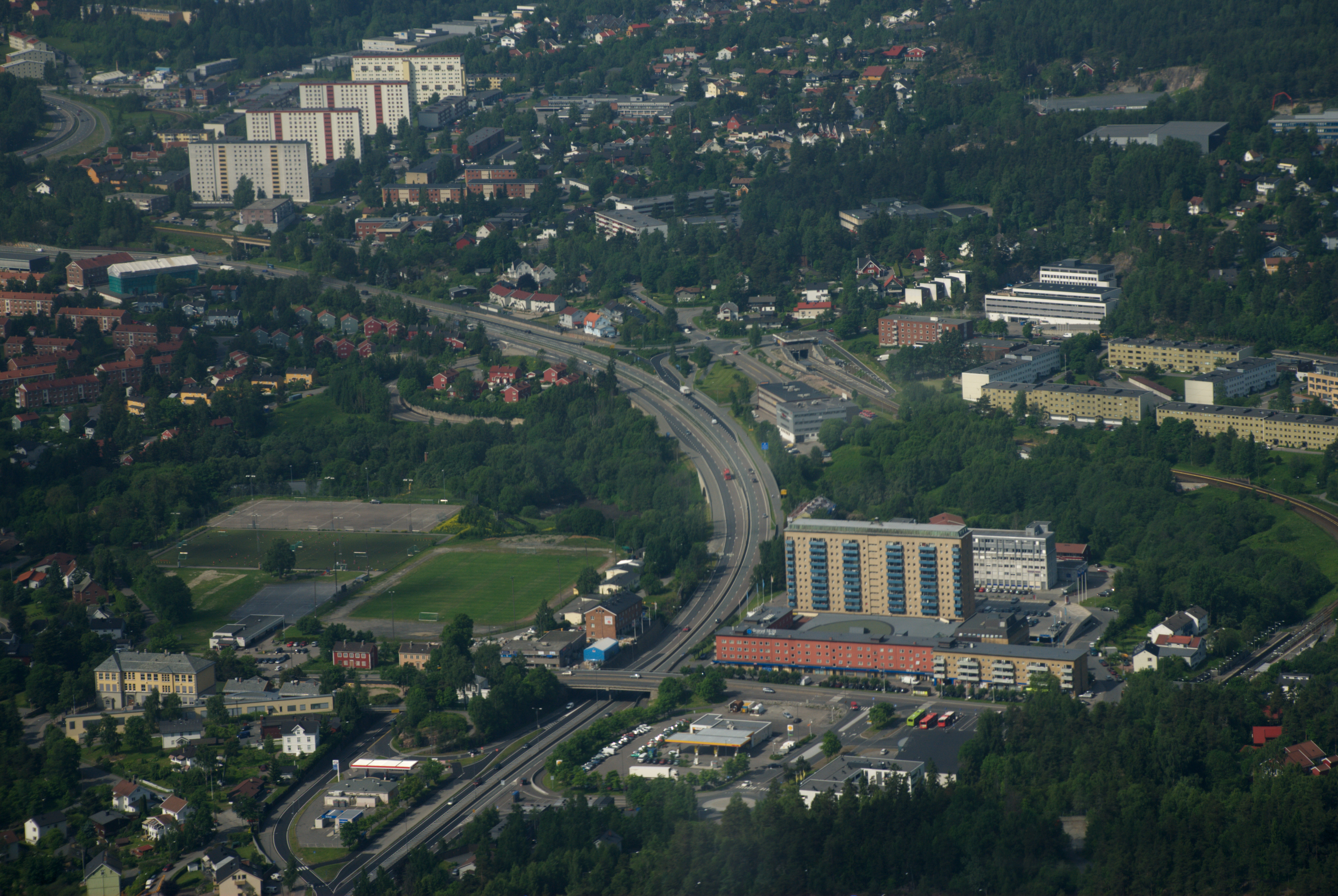 Grorud senter